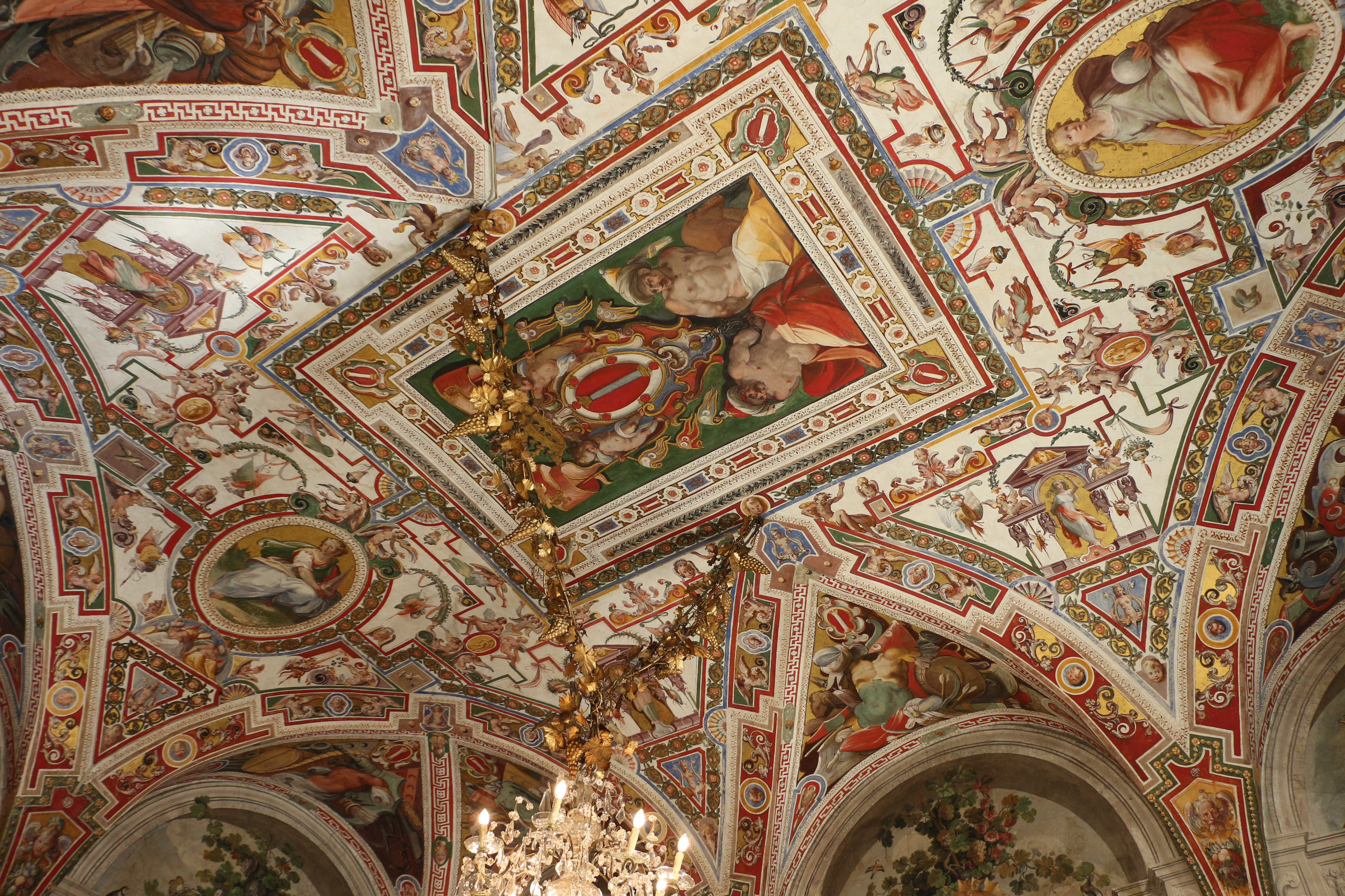 Palazzo colonna, appartamento della principessa isabelle, sala del dughet, affreschi di cristoforo pomarancio e scuola 01.JPG